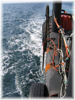 Zelf gemaakt